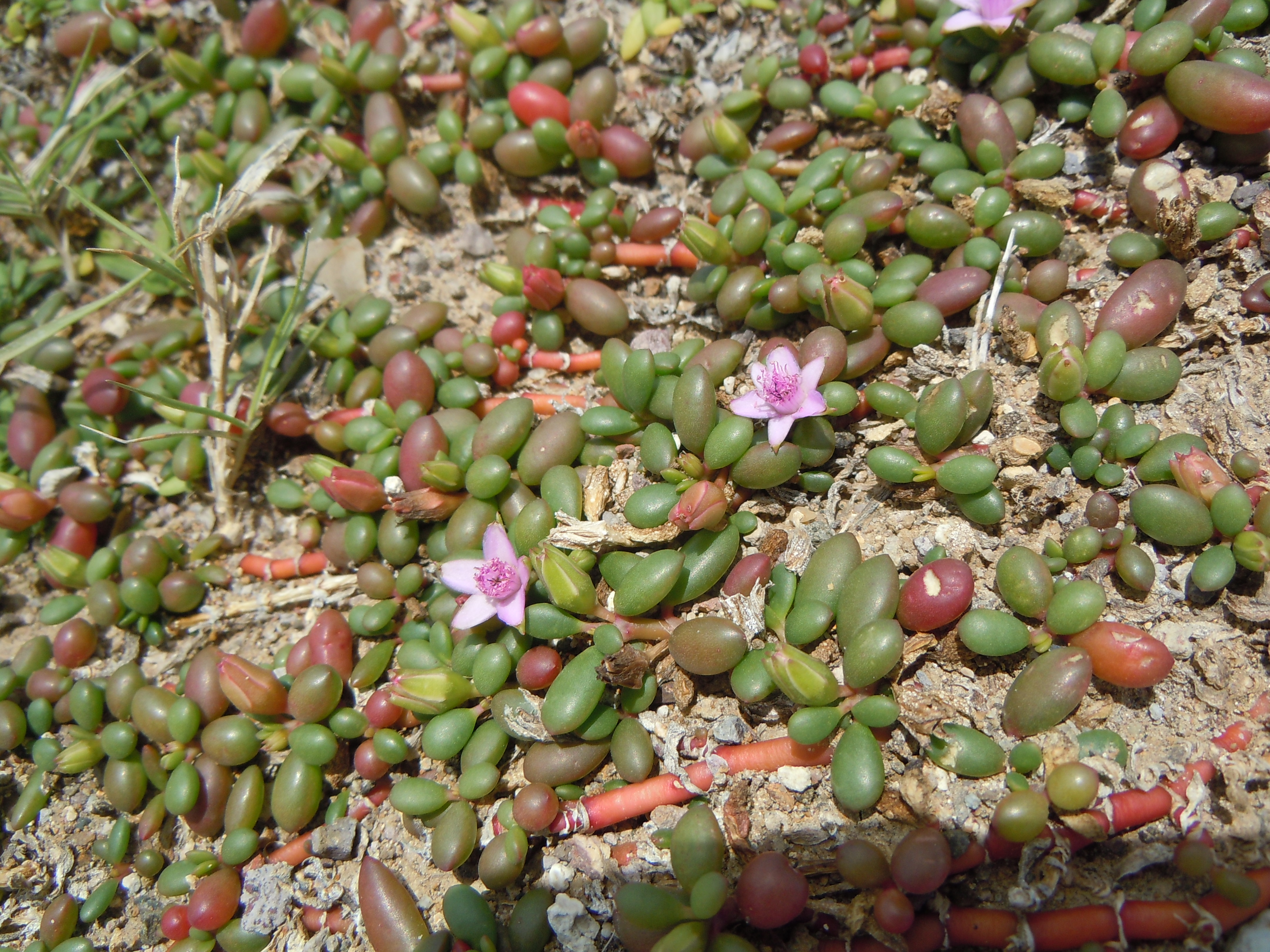 Sesuvium portulacastrum en Martinique, savane des Pétrifications